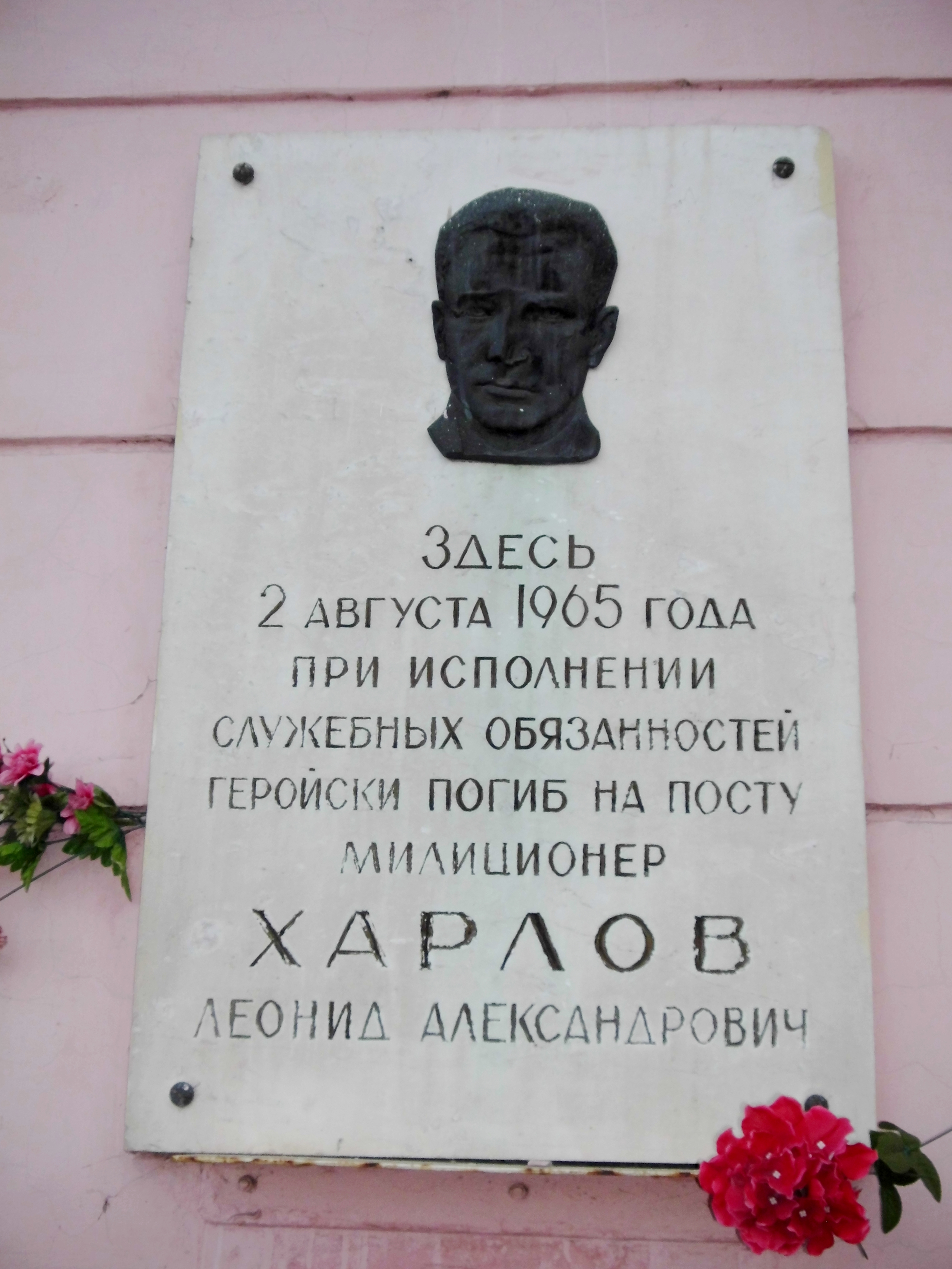 Здание, где погиб милиционер Харлов Л. А.: улица Гагарина, 2 / Харлова, 1, Челябинск, Челябинская область. Памятная табличка на торце наружного угла дома.